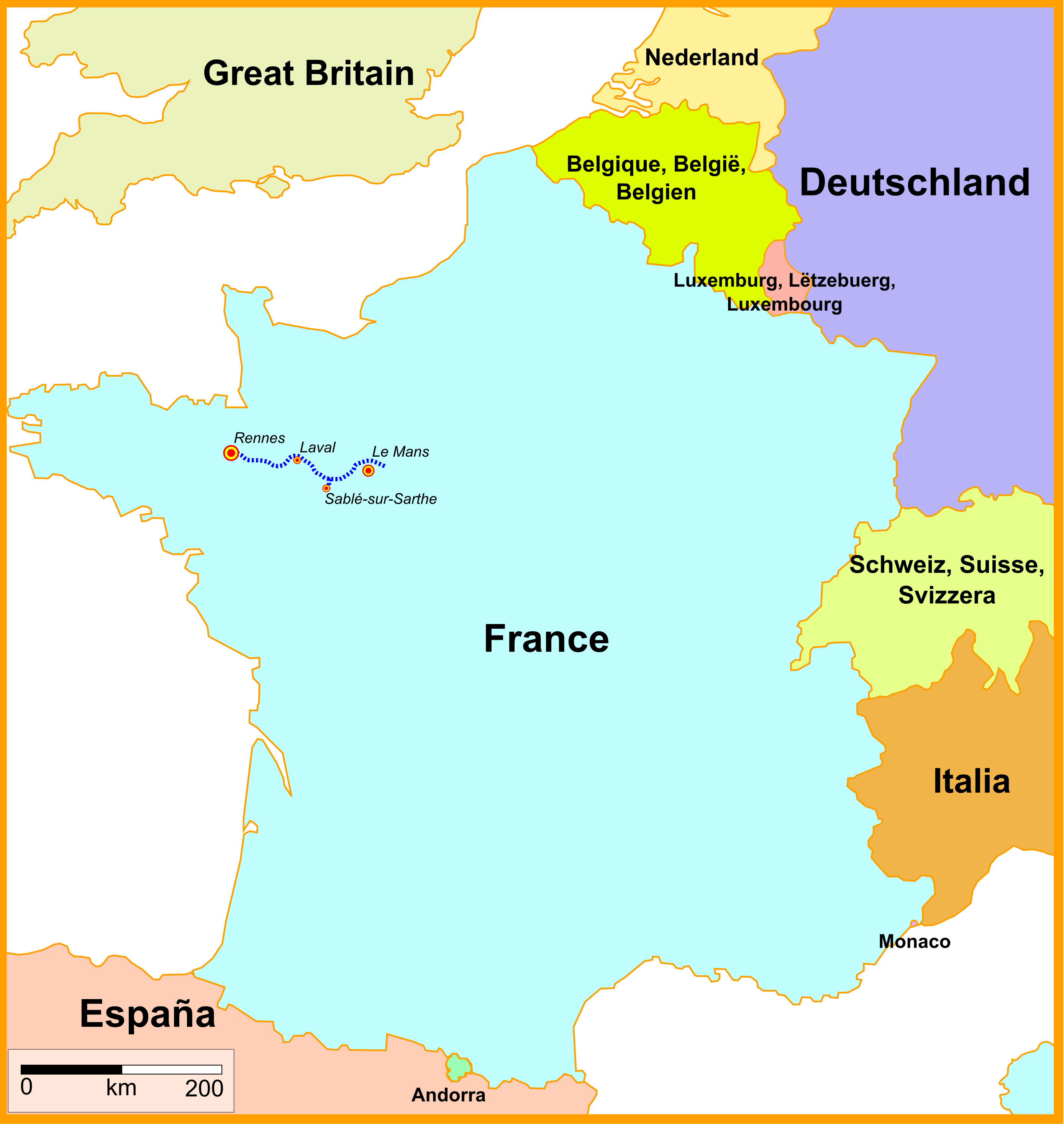 Carte de la LGV Bretagne-Pays de la Loire